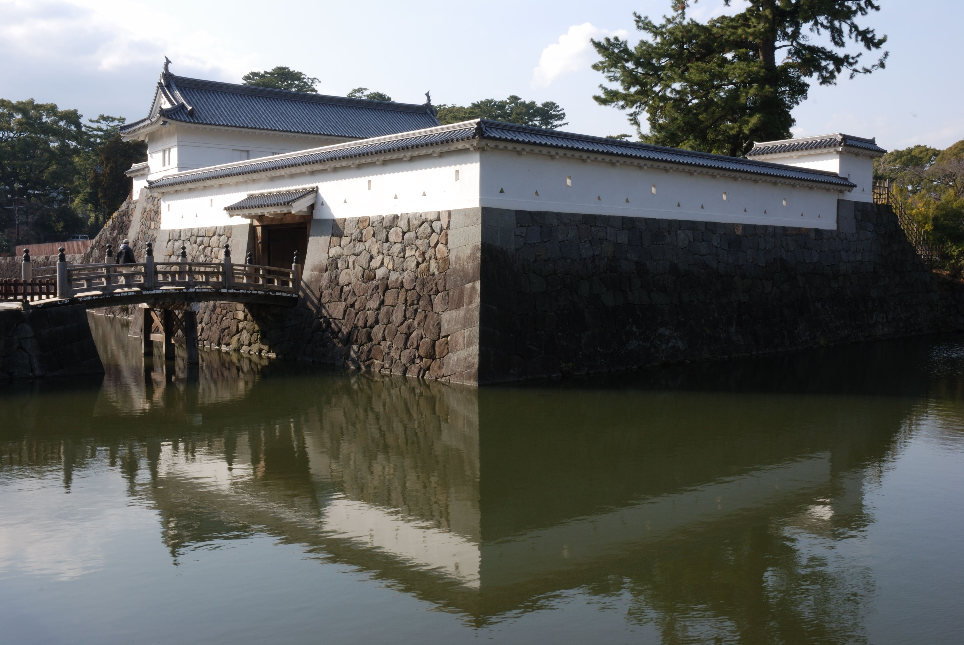 Akagane mon